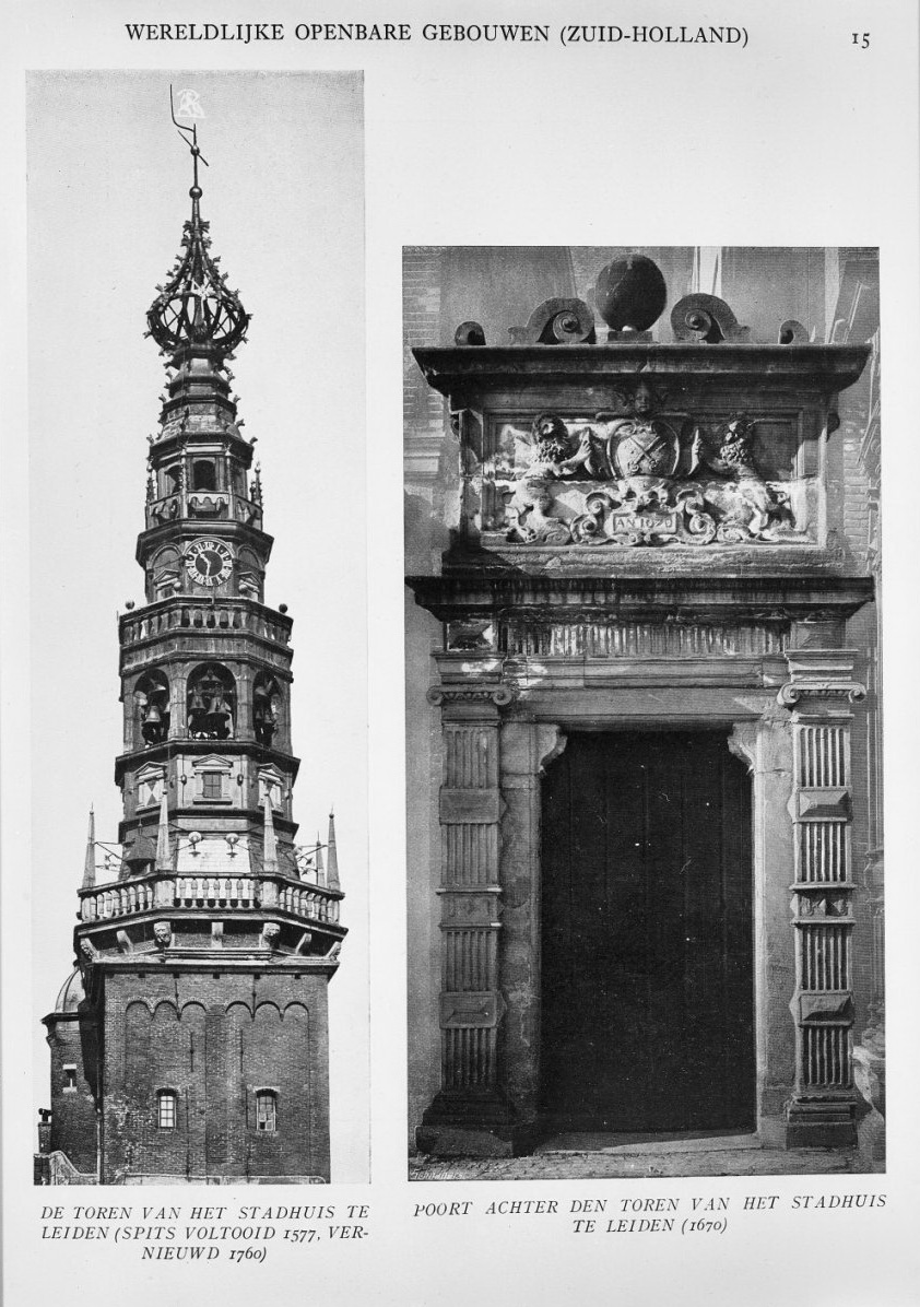 Stadhuis: toren, reproductie uit A.Loosjes, Wereldl. en openbare gebouwen Z.H.